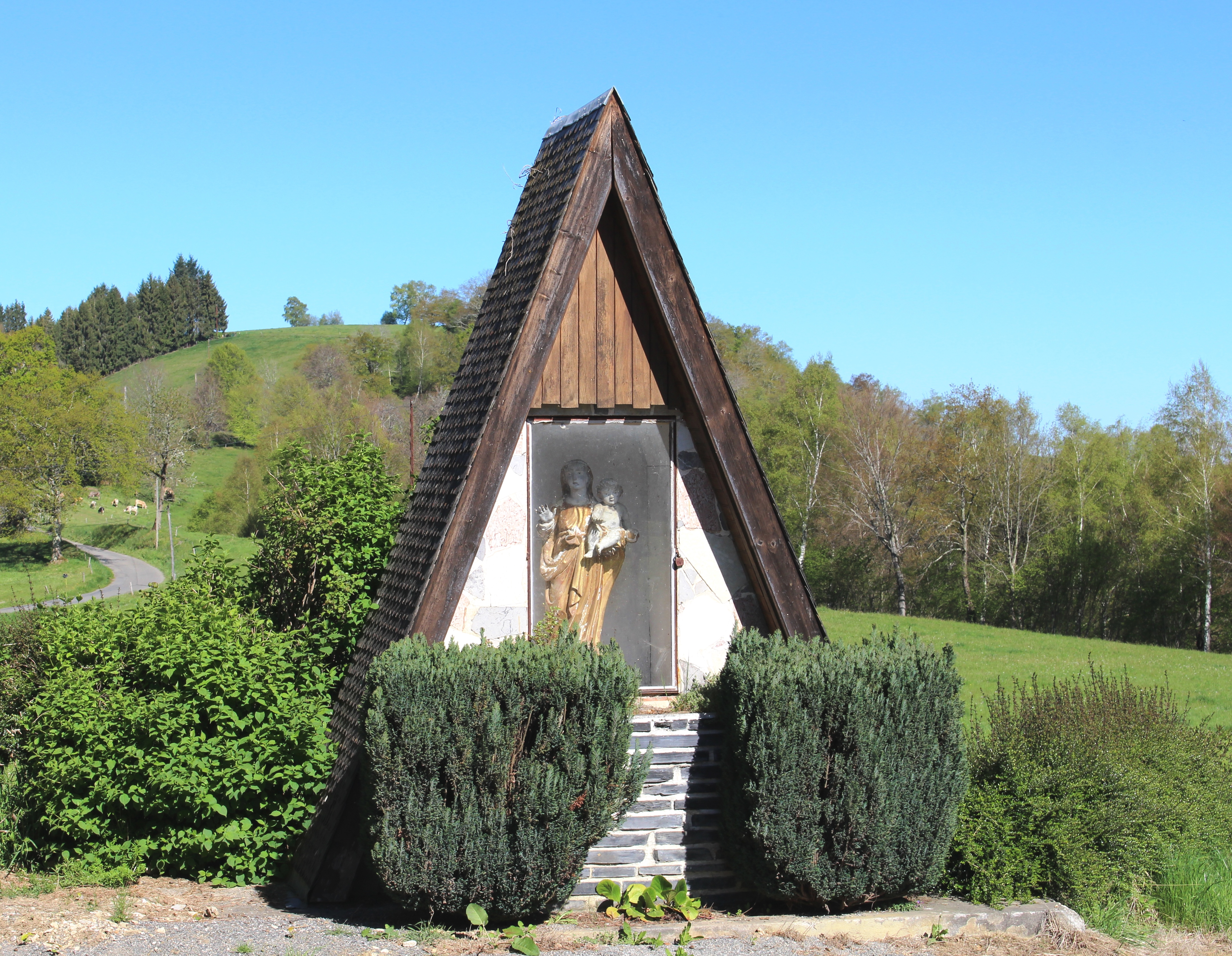 Oratoire de Labassère (Hautes-Pyrénées)